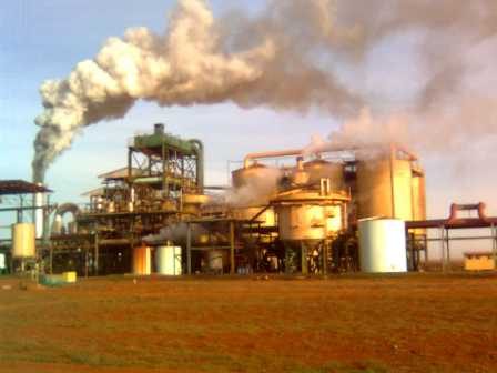 Pátio Industrial em 2008